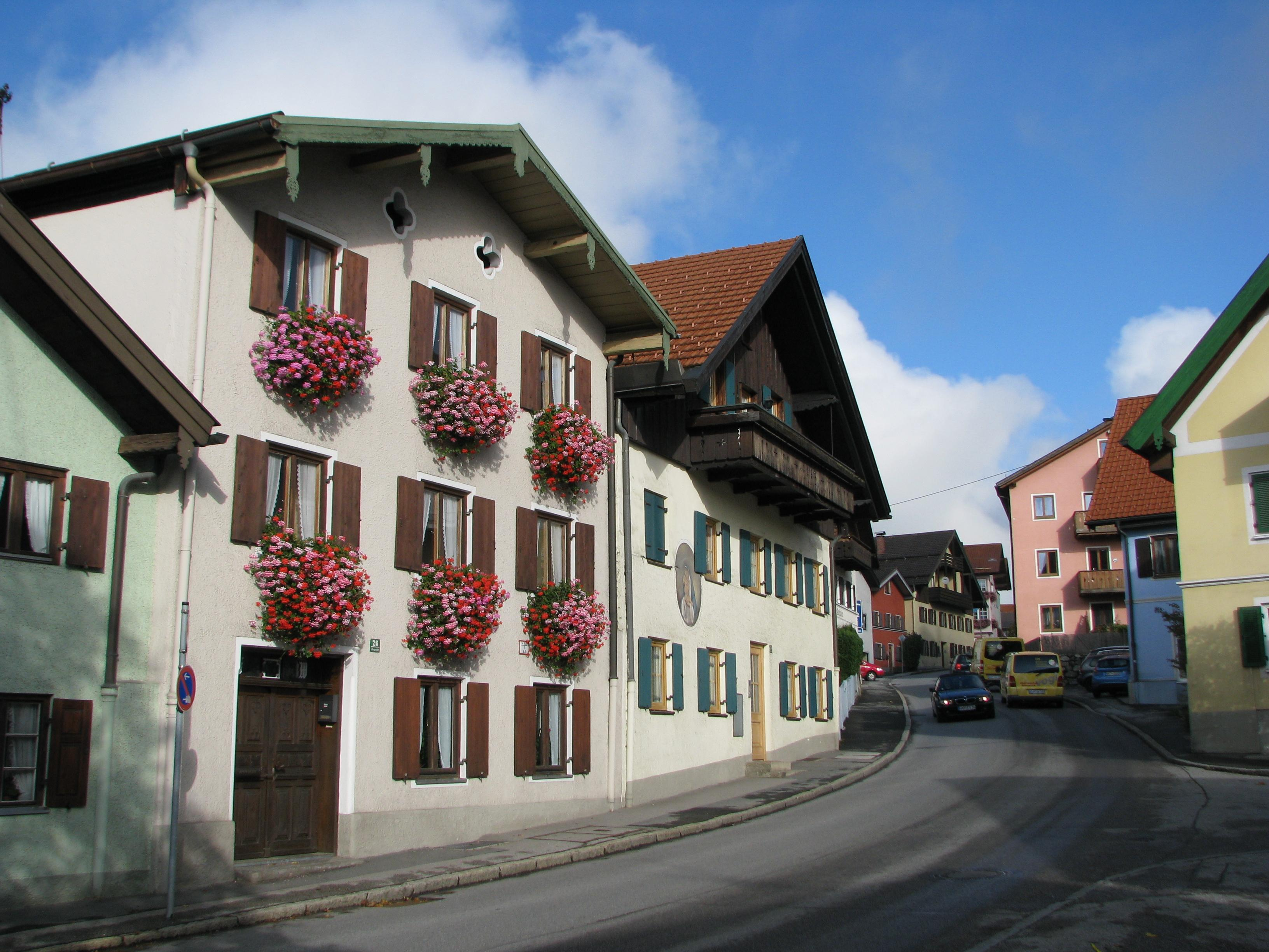 Altstadthäuser In Murnau am Staffelsee.